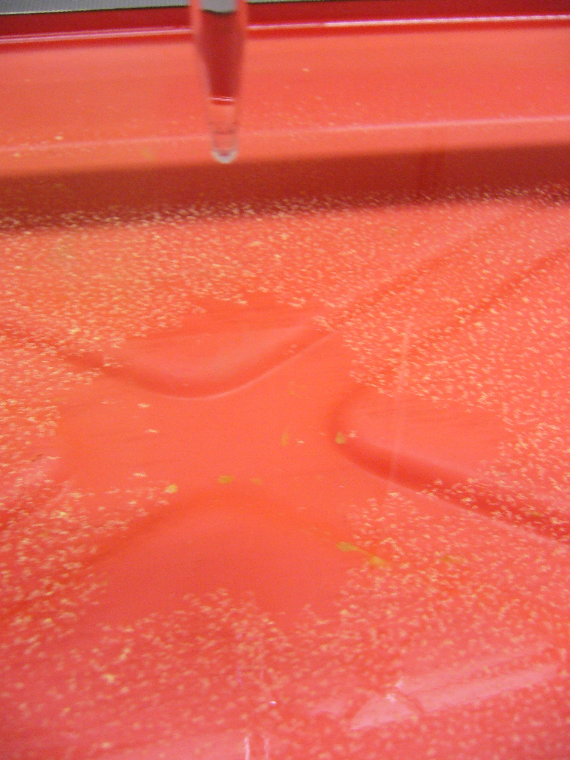 Ölfleckversuch, Erster Tropfen ist gefallen